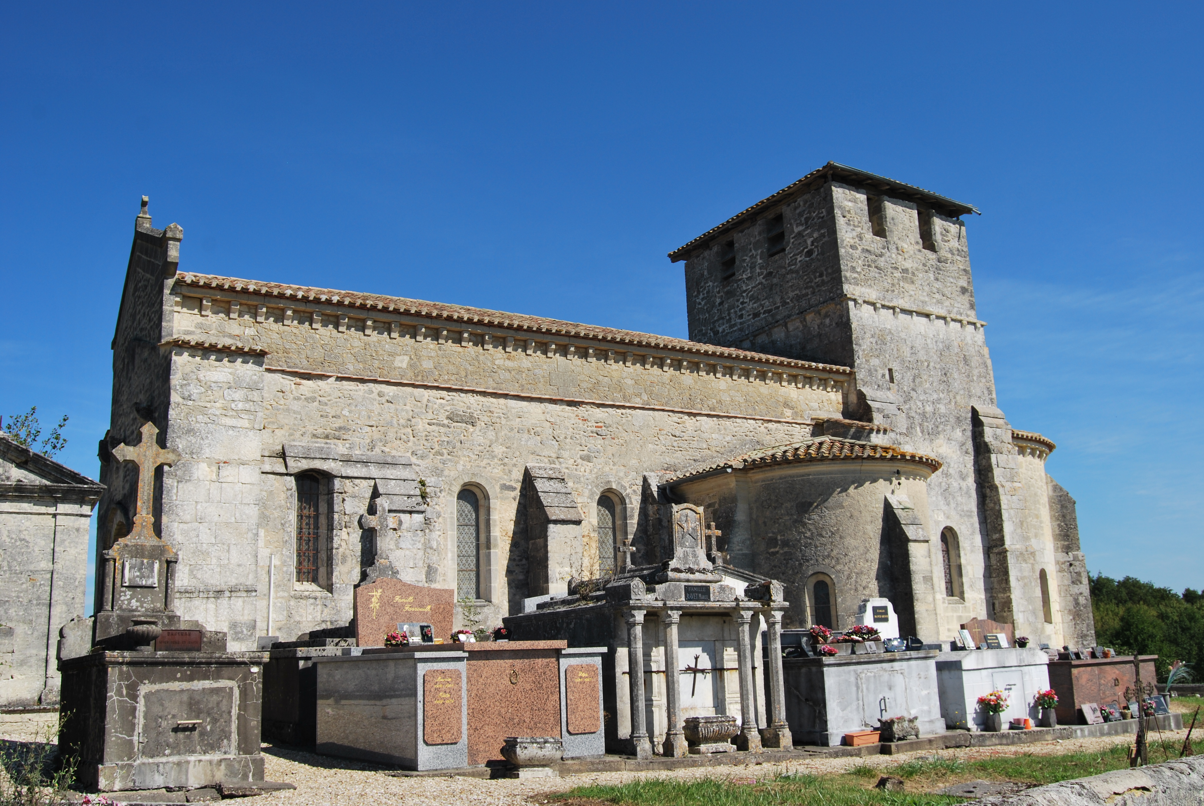 Église de Saint-Martin-de-Laye .